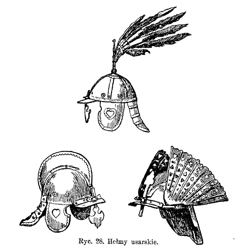 Helmy husarskie wg. T. Korzona